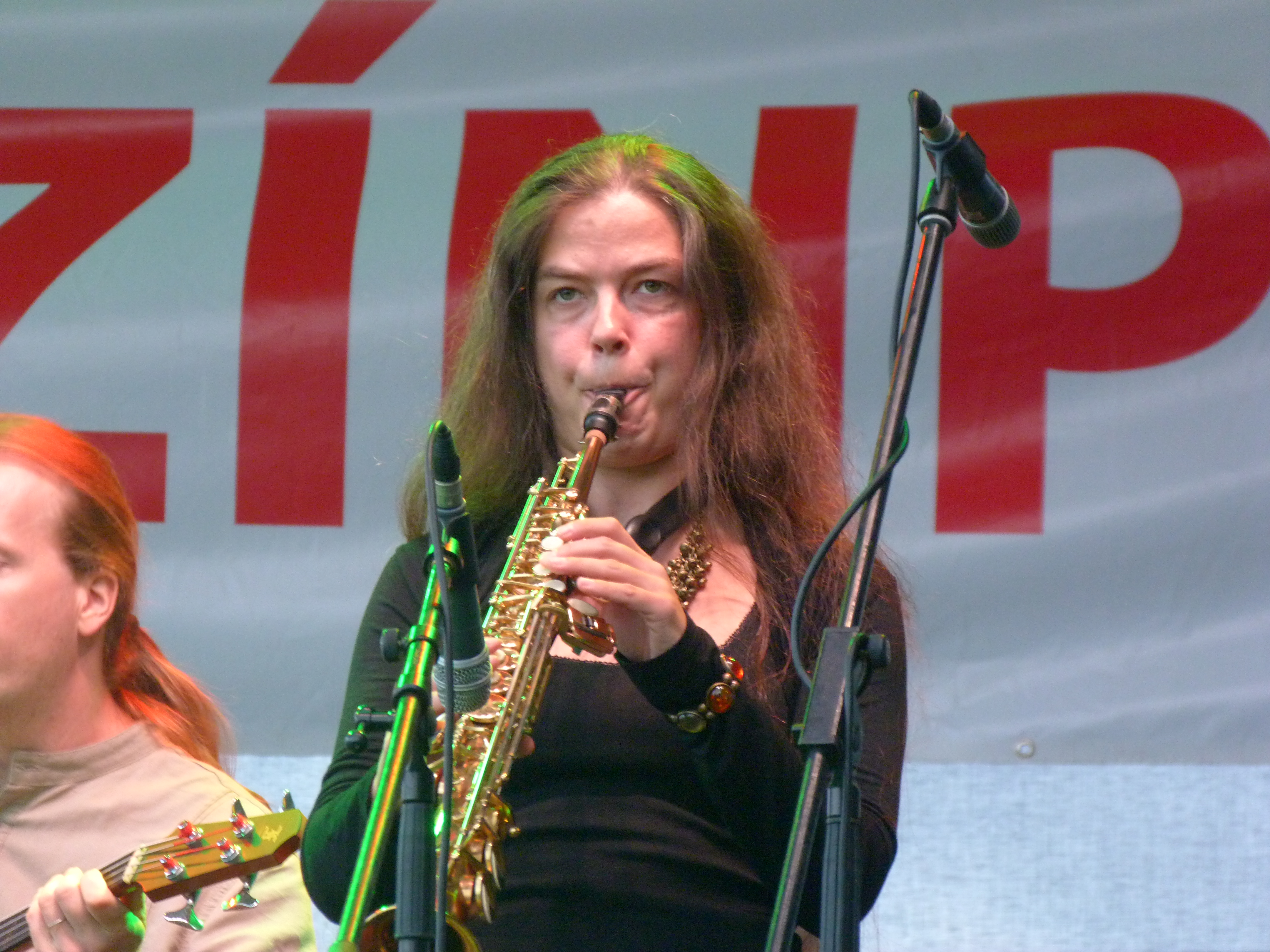 A felvétel 2014. szeptember 12-én, pénteken készült Budapesten, a 23. Budavári Borfesztiválon. Nagyszínpad, a Makám együttes és vendégei. Az együttes tagjai: Krulik Zoltán - gitár Korzenszky Klára - ének Kuczera Barbara – hegedű, vokál Boros Attila - basszusgitár Eredics Dávid - fúvós hangszerek Keönch László - ütőhangszerek Mohai György - hangmérnök ( Szalóki Ágnes, Lovász Irén. Bognár Szilvia: Katona sirató KATONA SIRATÓ MAKÁM BOGNÁR SZILVIA MIHI 2014 Források Bor és Pia borpiaci szakmai magazin 2014. augusztus Borfesztivál Melléklet 23. Budavári Borfesztivál kiállítási tájékoztató ©© Derzsi Elekes Andor, Budapest, 2014, A kép és filmfelvételek egészben, vagy részletekben másolását, bármilyen úton történő sokszorosítását és felhasználását a szerző ellenérték nélkül, jogutódjaira is kihatóan megengedi. Az engedély kiterjed a kereskedelmi célú hasznosításra is. Kéri azonban nevének feltüntetését a felhasználás során. A Metapolisz sorozat valamennyi képe és filmje Creative Commons alatti valamint kereskedelmi - for profit - célra is felhasználható. Ajánlott hivatkozás: Derzsi Elekes Andor: Metapolisz DVD line